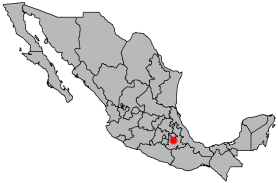 Location of Puebla de los Ángeles, Puebla, Mexico